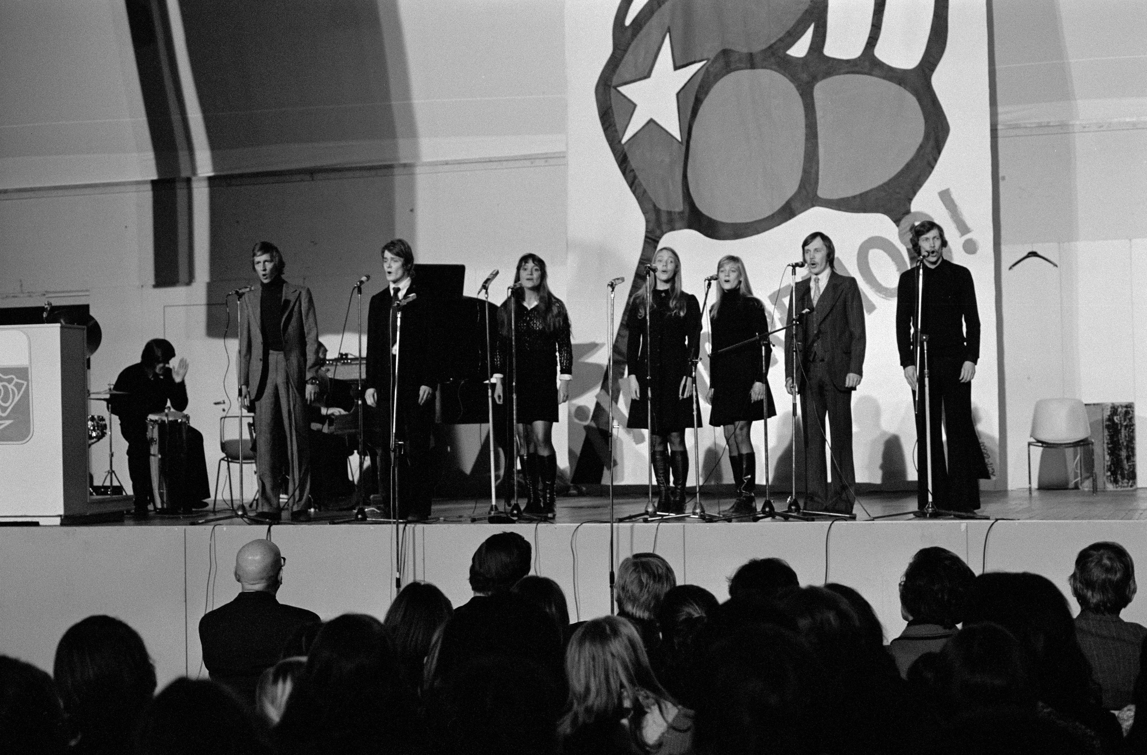 KOM-teatterin kuoro rumpaleineen esiintymässä solidaarisuuskonsertissa Messuhallissa. Katsomossa eturivissä vasemmalla tasavallan presidentti Urho Kekkonen. KOM-teatterin kuorossa vasemmalta Sulevi Peltola, Vesa Repo, Rea Mauranen, Riitta-Liisa Helminen, Marja-Leena Kouki, Pekka Milonoff ja Erkki Saarela. Vasemmalla rummuissa Ari Valtonen.